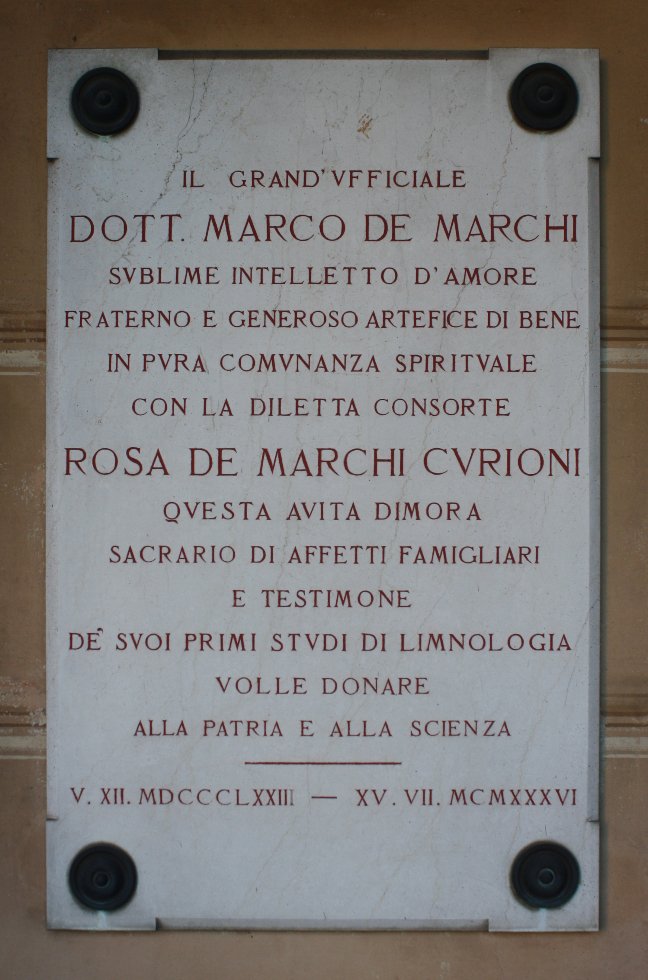 targa dedicata a Marco De Marchi presso l'Istituto di ricerca sulle acque di Verbania.